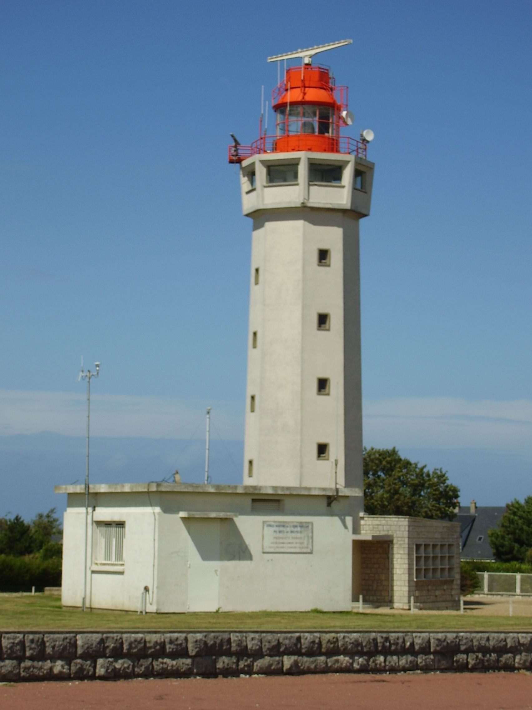 Le Havre, Frankreich